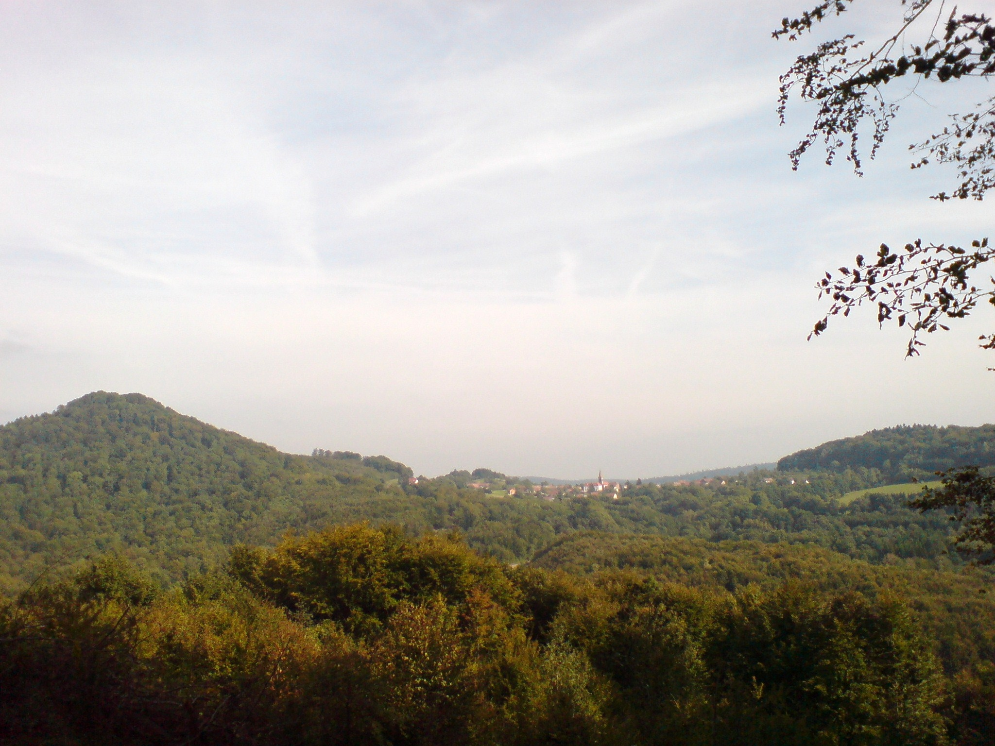 Il s'agit d'une vue sur Étobon, un village de Haute-Saône dans les Vosges Saônoises.